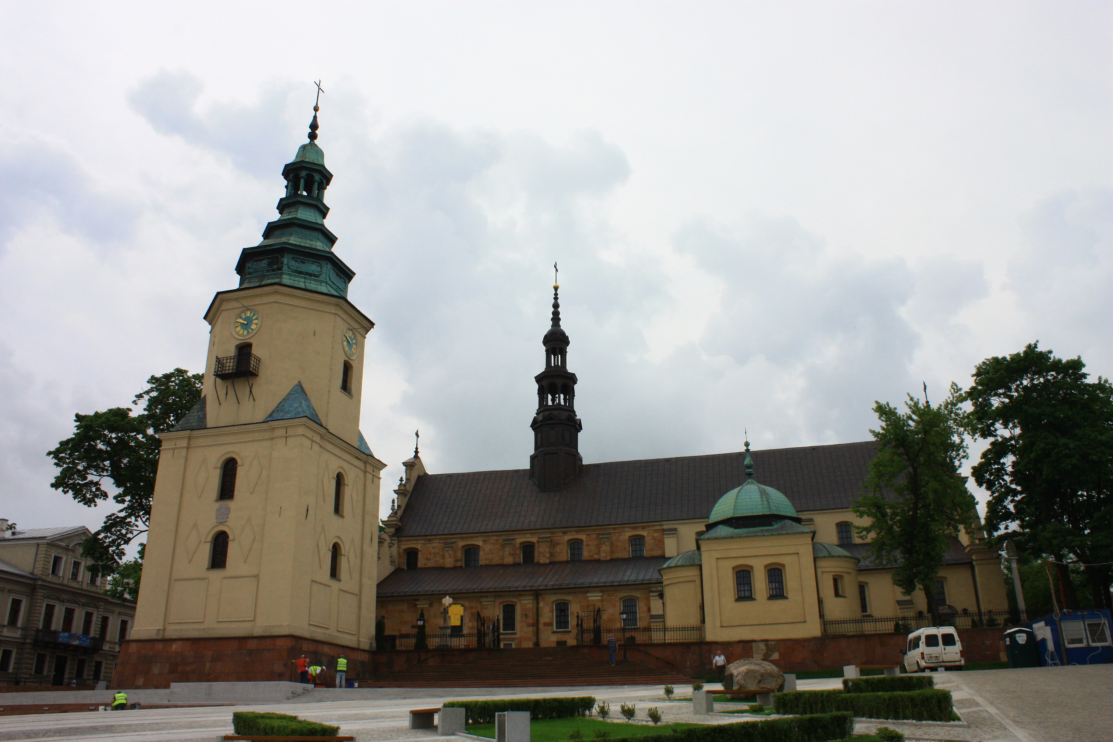 Kielce, zespół katedralny